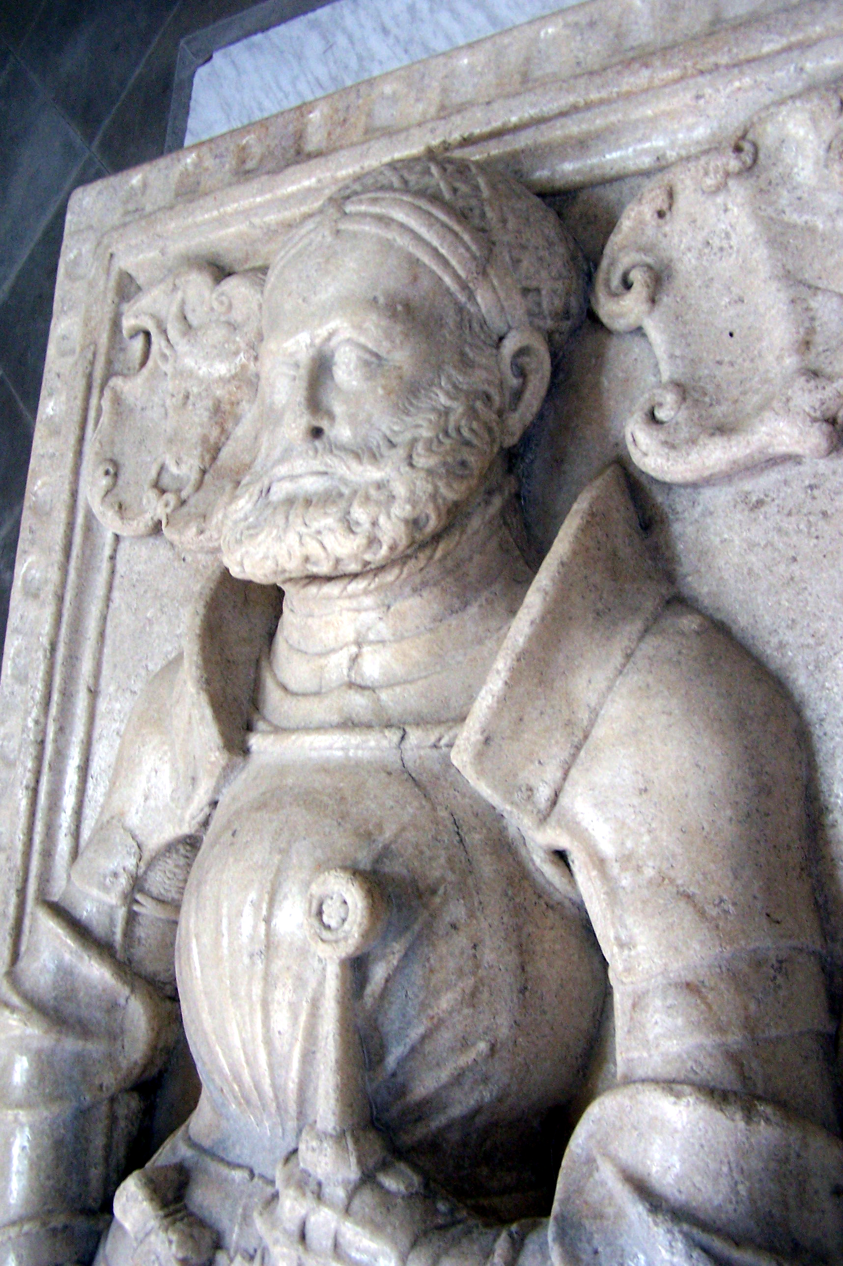 Kostel svatého Bartoloměje (Pardubice). Náhrobek Vojtěcha z Pernštejna (1479–1534)